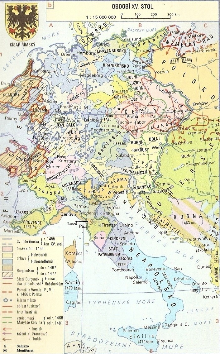 Mapa